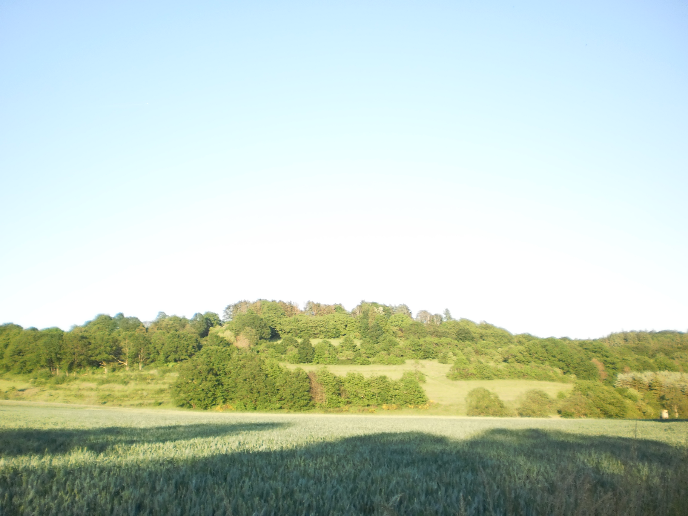 Naturnaher und mit landwirtschaftlichen Terassen kleinteilig strukturierter Hasenkopf-Hang von Westen nahe Neuhöfe (weiter links) und unterhalb Marburg-Stadtwald mit Quellgebiet des Cyriaxweimarer Bachs, 2019-06-02